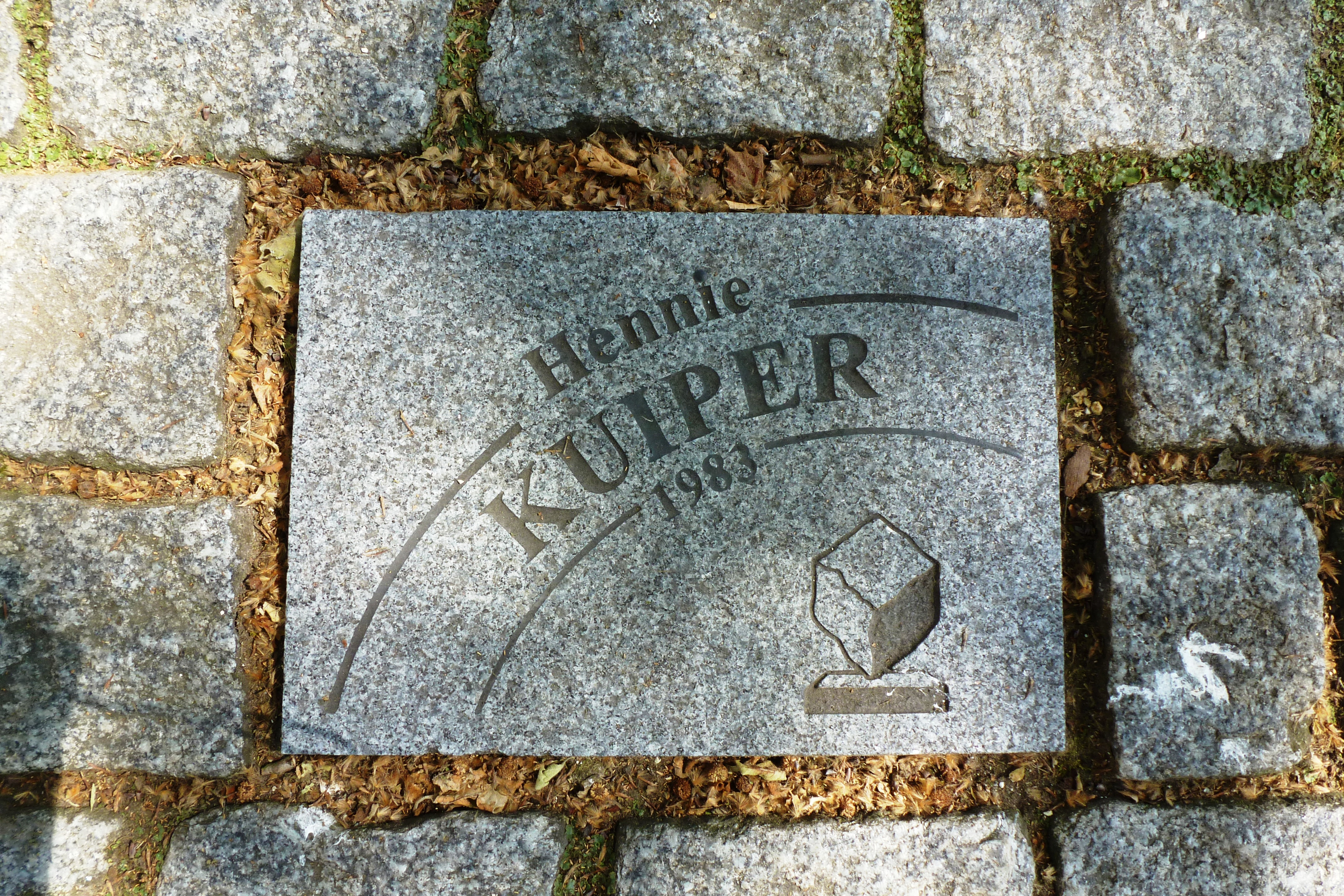 Pflasterstein für Hennie Kuiper auf der Allée Charles Crupelandt in Roubaix